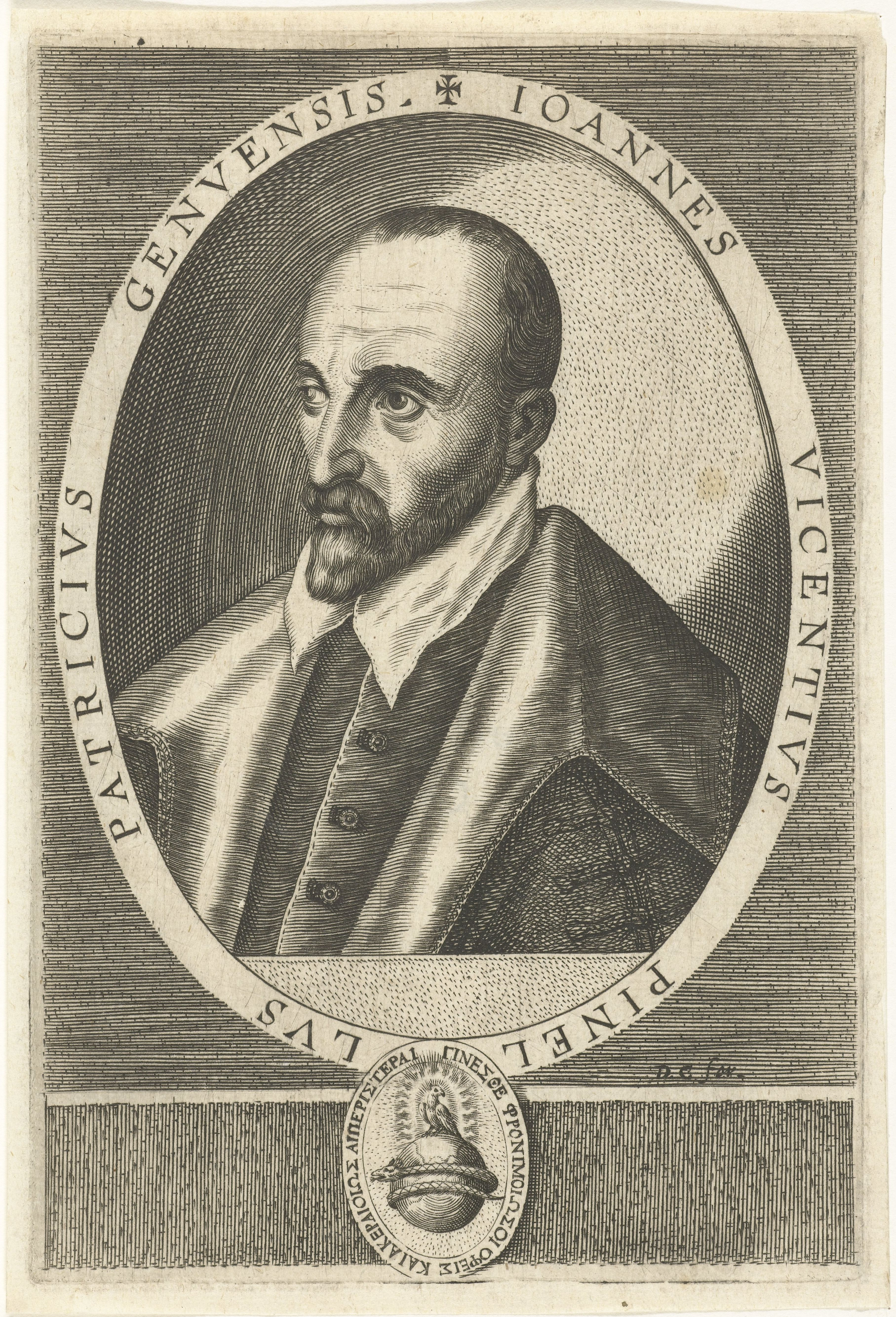 IdentificatieTitel(s): Portret van Gian Vincenzo PinelliObjecttype: prent Objectnummer: RP-P-1908-2636Catalogusreferentie: LeBlanc 36Opschriften / Merken: verzamelaarsmerk, verso, gestempeld: Lugt 2228VervaardigingVervaardiger: prentmaker: Dominicus Custos (vermeld op object)Plaats vervaardiging: AugsburgDatering: 1579 - 1615Fysieke kenmerken: gravureMateriaal: papier Techniek: graveren (drukprocedé)Afmetingen: plaatrand: h 168 mm × b 113 mmOnderwerpWie: Gian Vincenzo PinelliVerwerving en rechtenVerwerving: aankoop 1905Copyright: Publiek domein